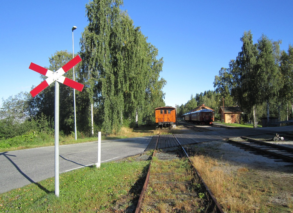 Fylkesvei 191 krysser Krøderbanen i nordkant av Krøderen stasjon.